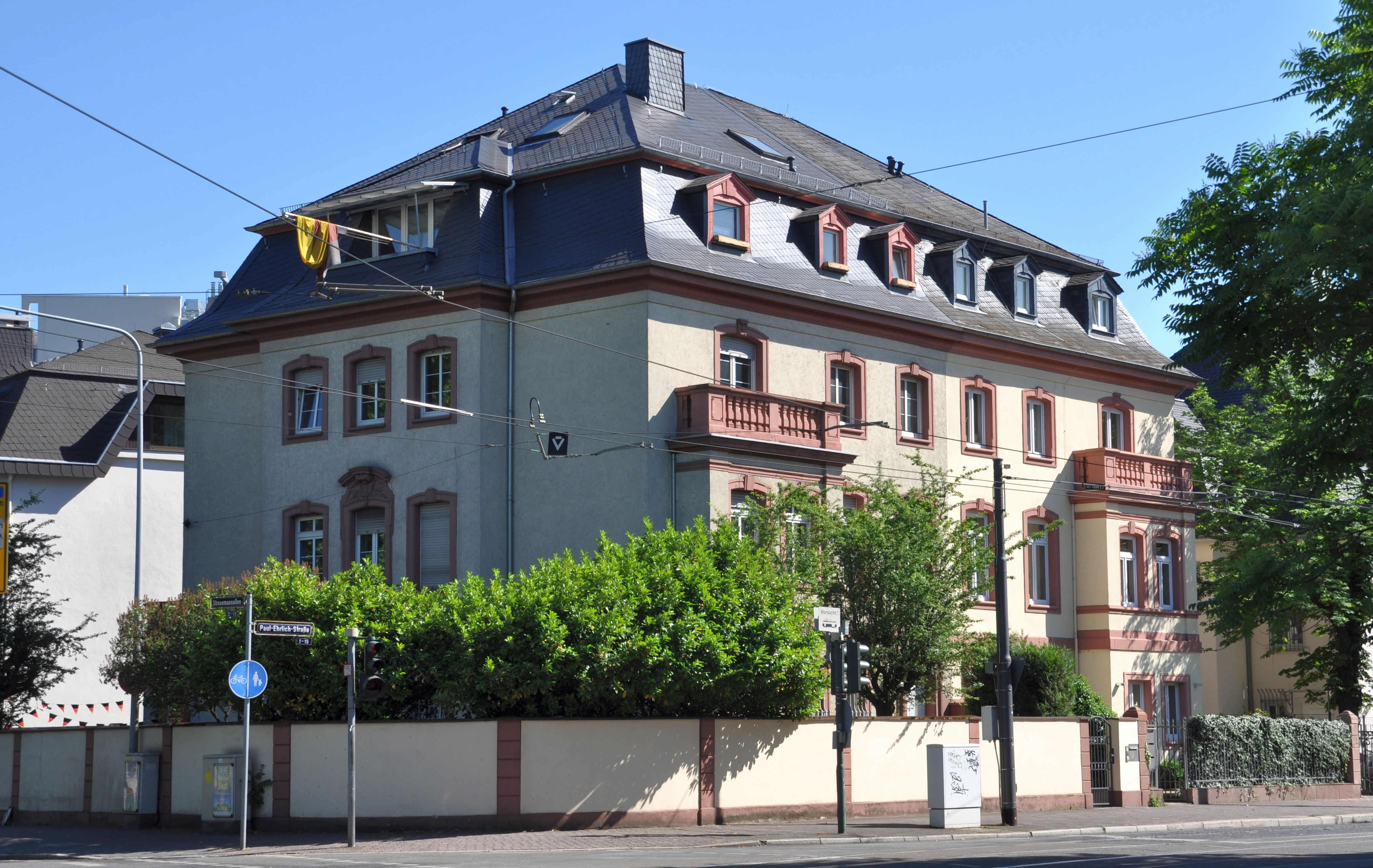 Haus der "Burschenschaft Arminia" in Frankfurt am Main; Architekt Julius Lönholdt